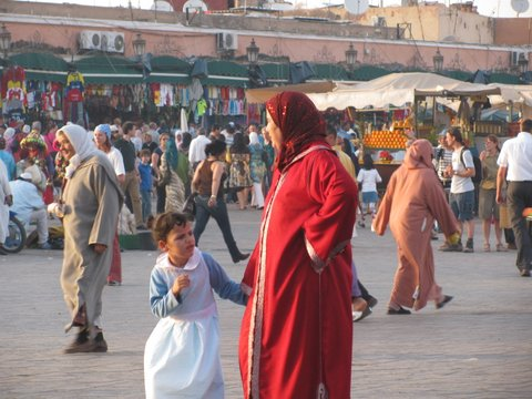 Maroko glavni trg